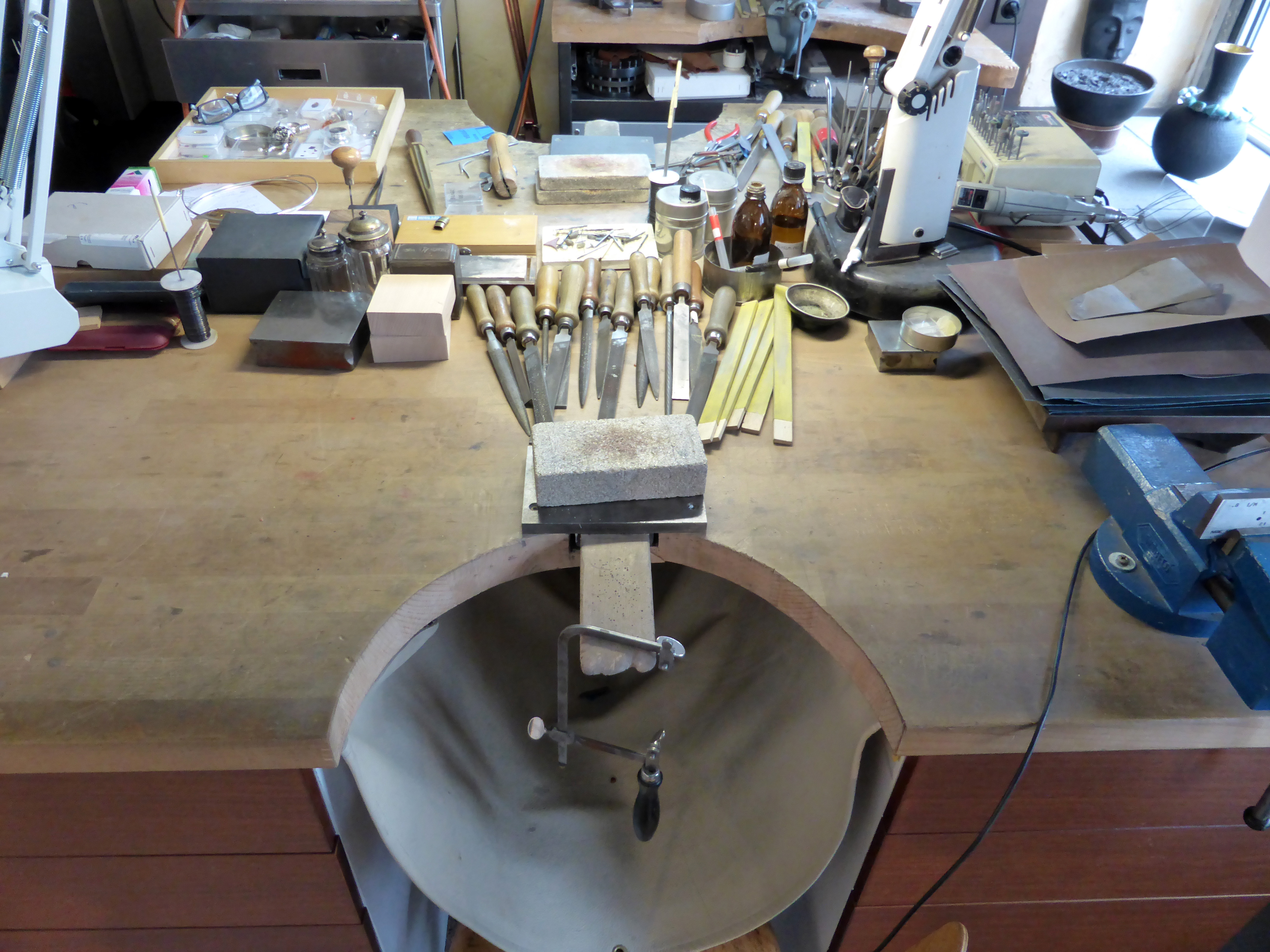 Goldschmiede, Werkbrett des Künstlers Terrumanum, Köln